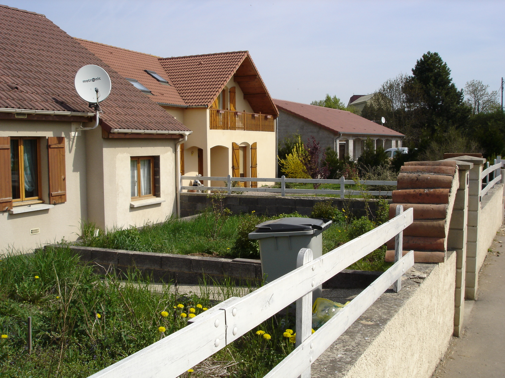 Pavillons en périphérie de Rosières-en-Haye -- Photo amateur prise par moi-même